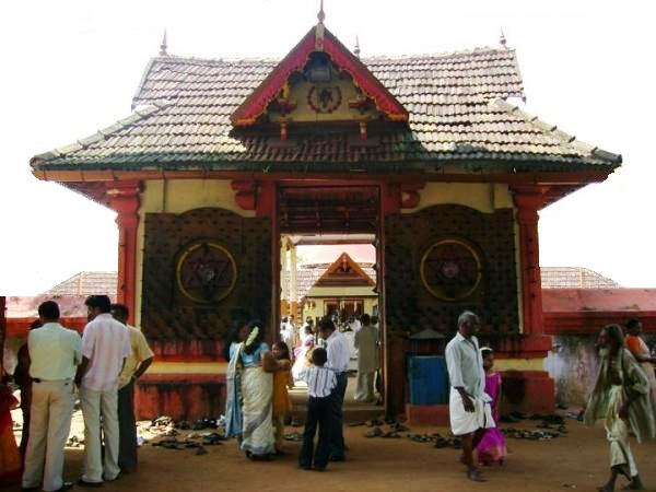 ആനന്ദവല്ലീശ്വരം ക്ഷേത്രം